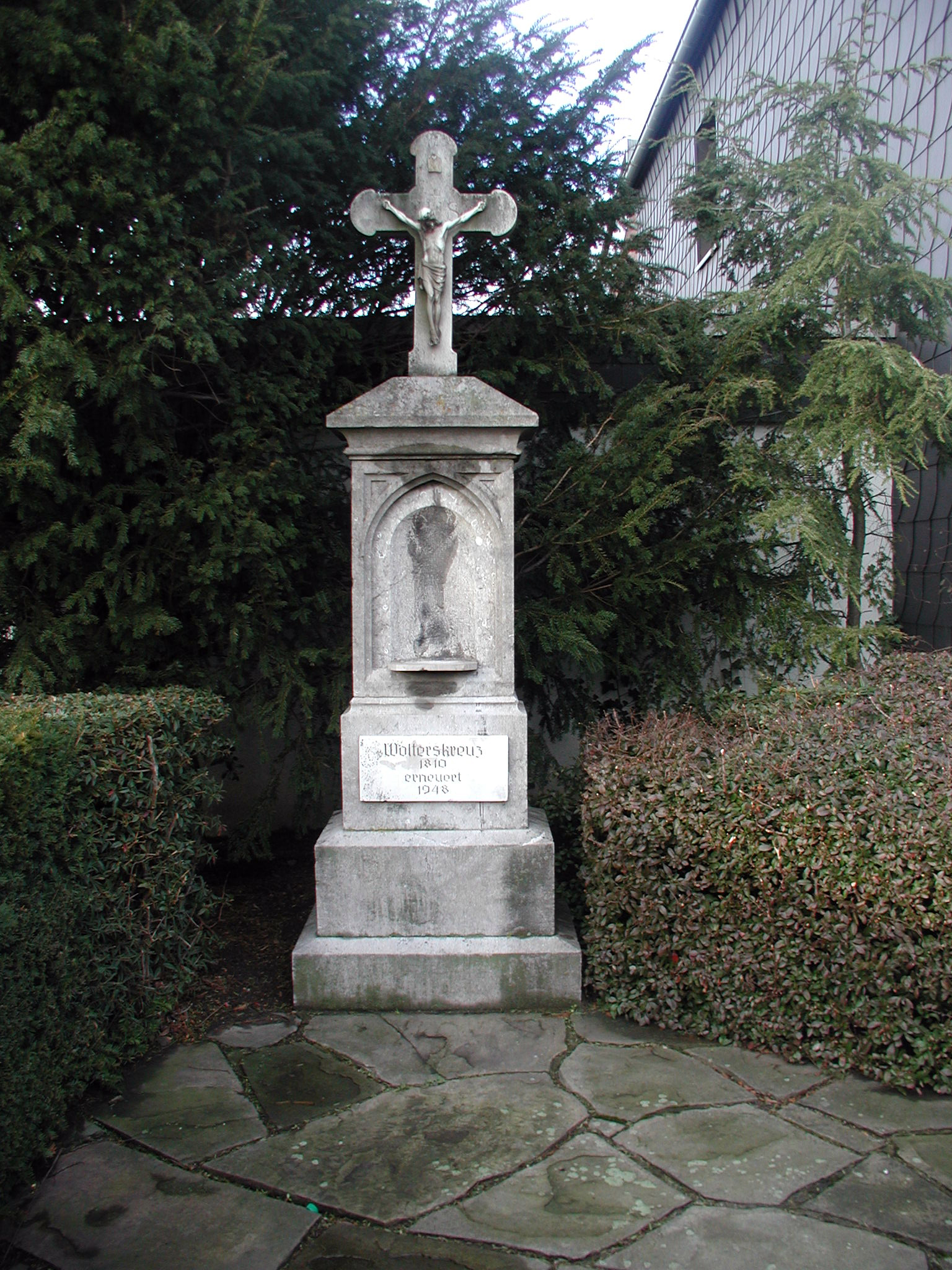 Hürth-Kendenich, „Wolters Kreuz“